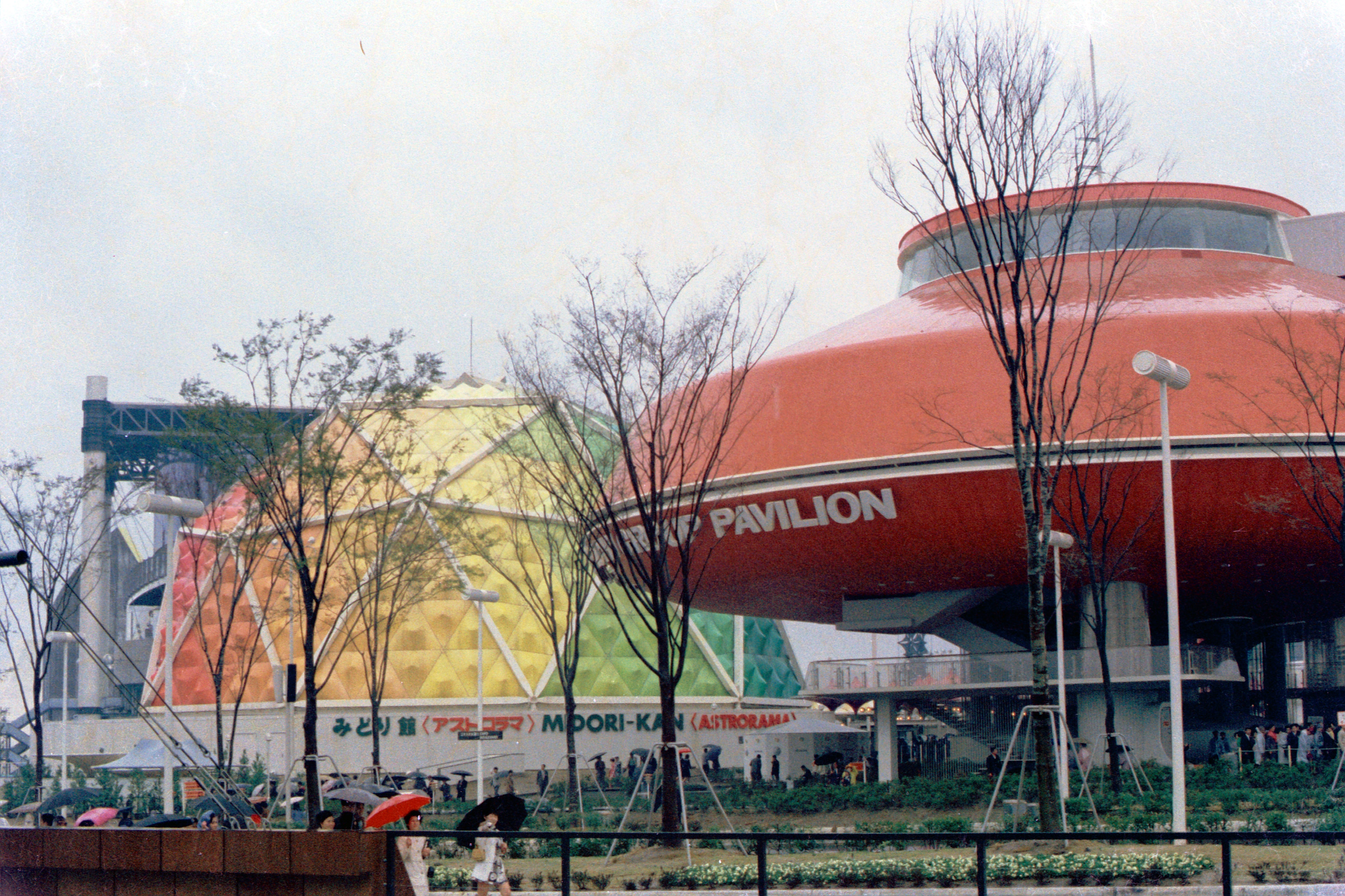 Hitachi Pavilion, Osaka Expo'70. April 1970.